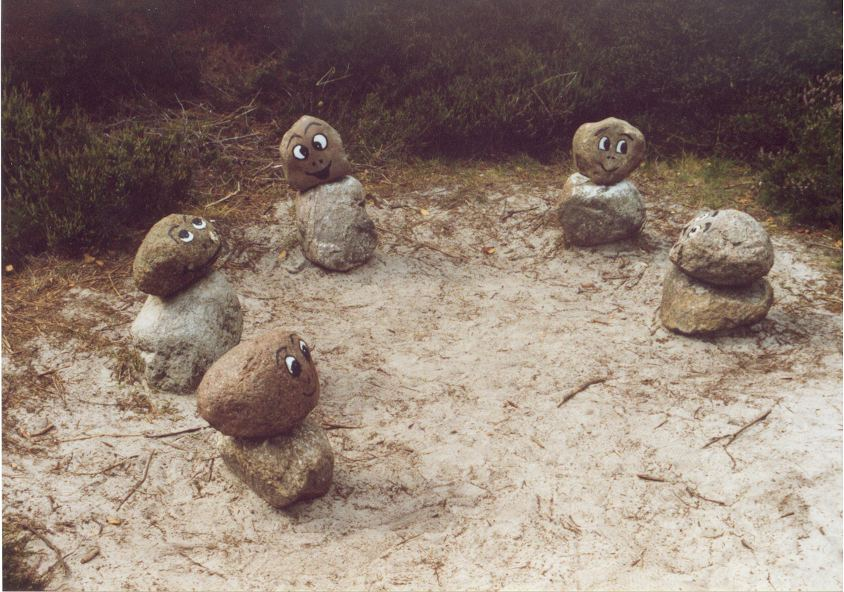 Sommeltjes langs het Sommeltjespad op Texel, eigen foto en hierbij vrijgegeven onder GNU/FDL